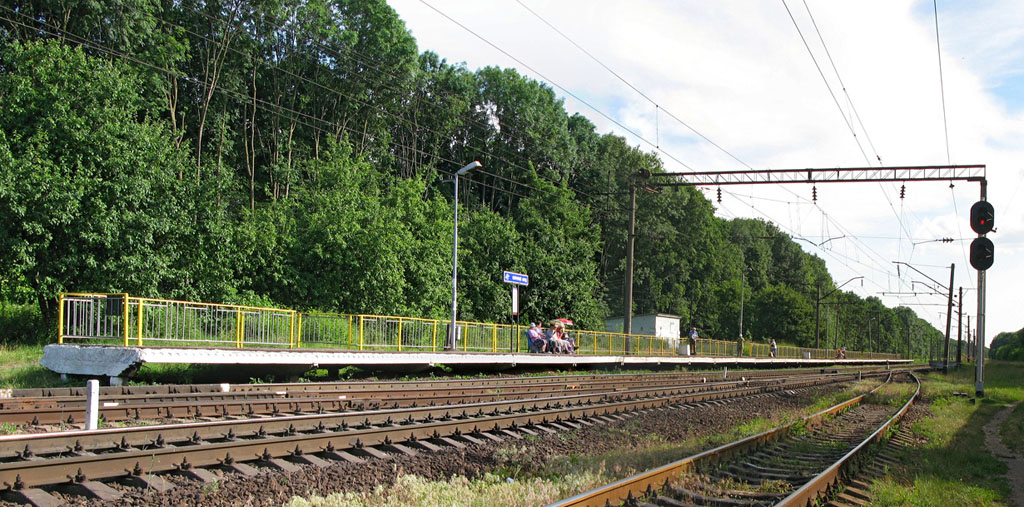 Платформа парного напрямку